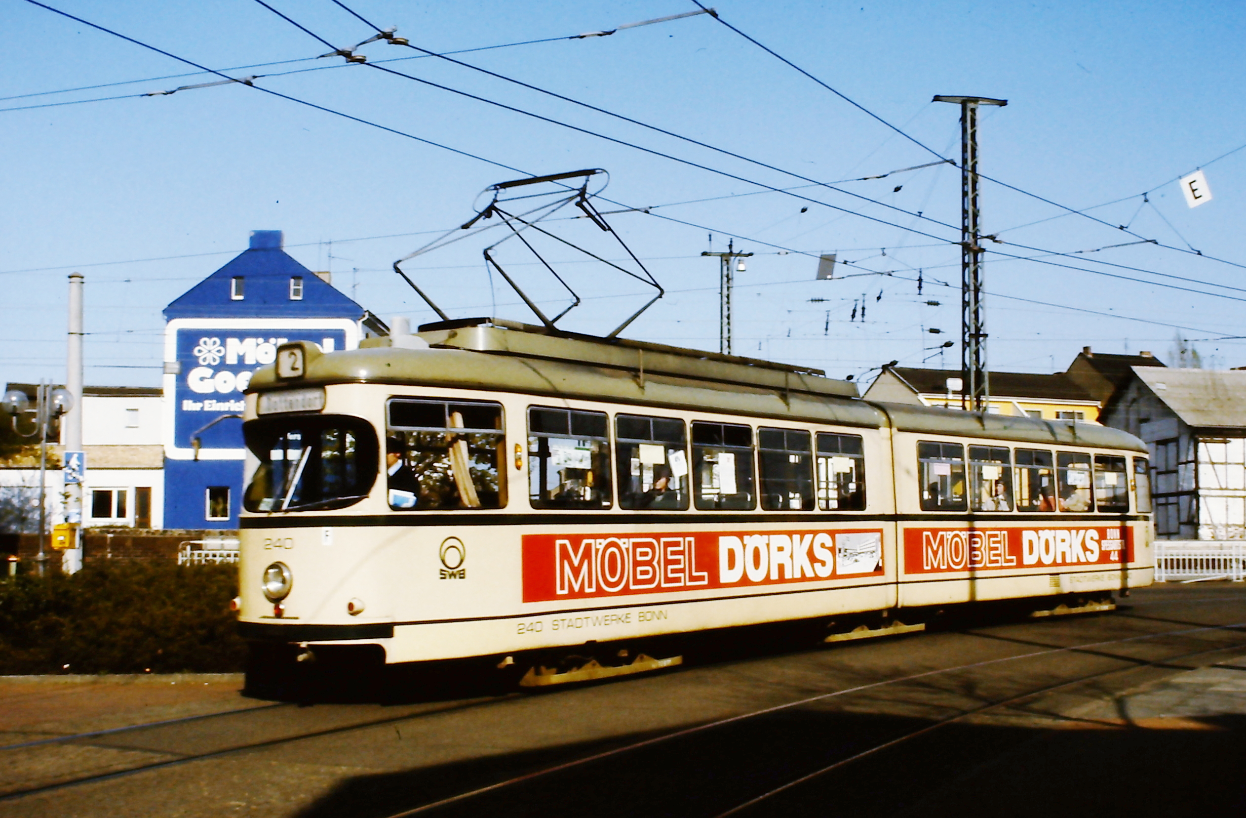 Triebwagen 240 der SWB als Linie 2 nach Dottendorf